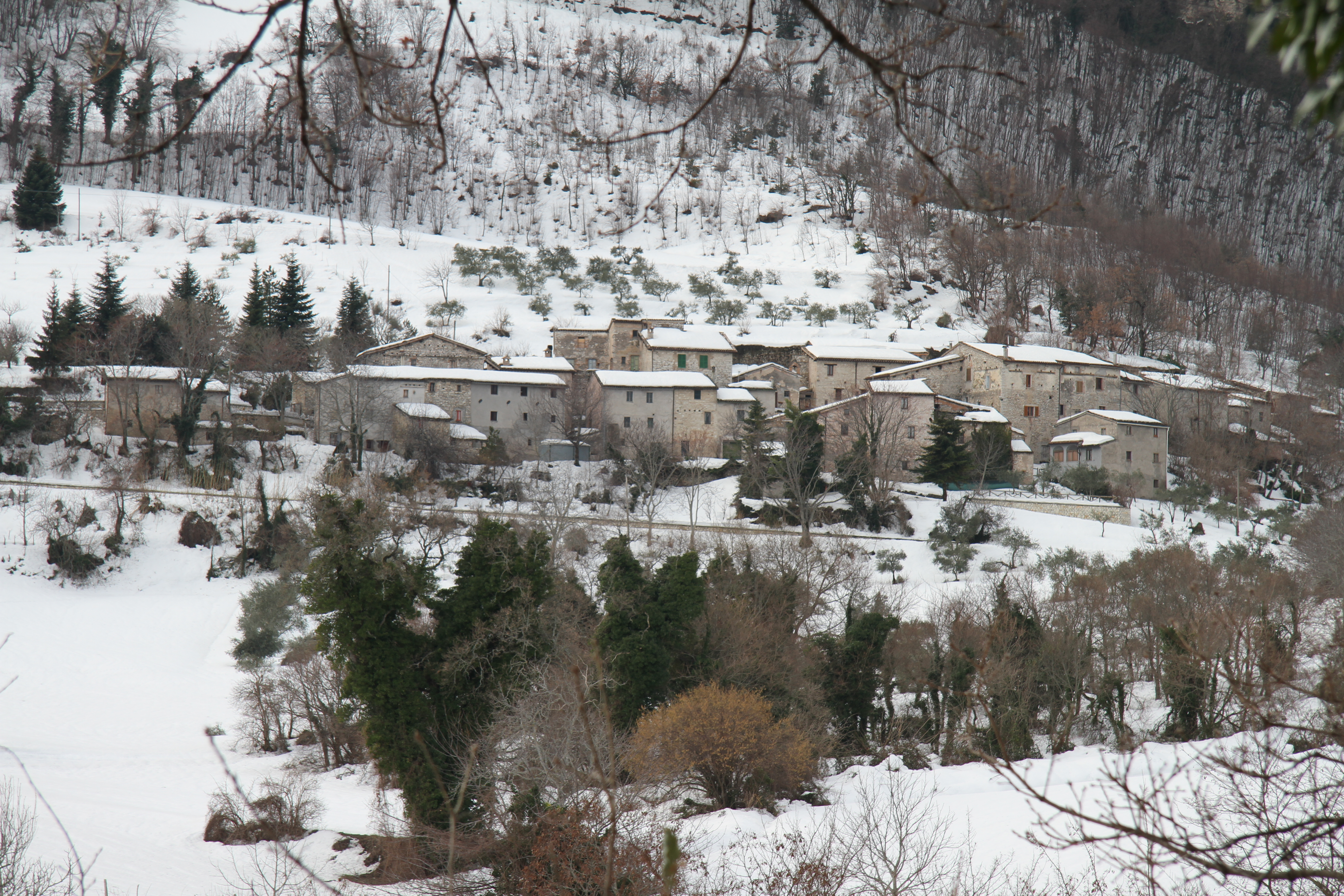 Vista - Frazione Valle di Montanto